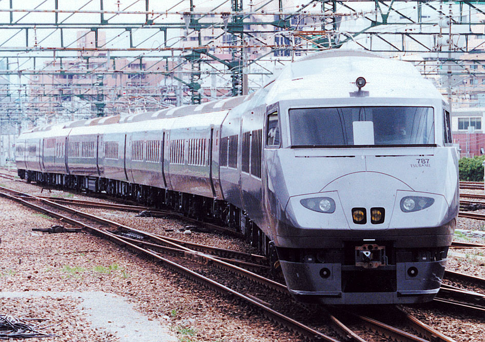 JR九州 787系特急形電車 特急「つばめ」